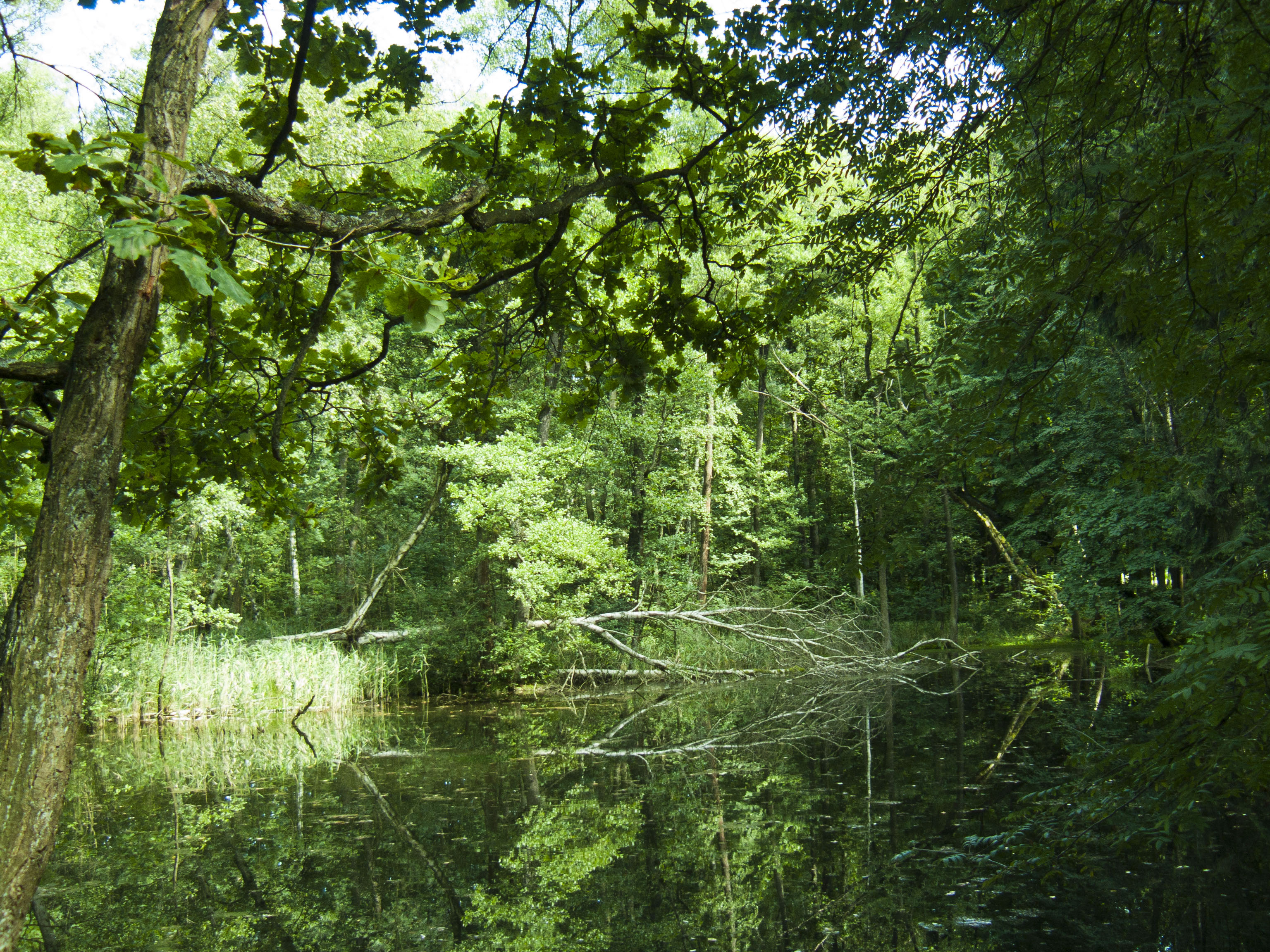 Přírodní památka Bělohradská bažantnice.